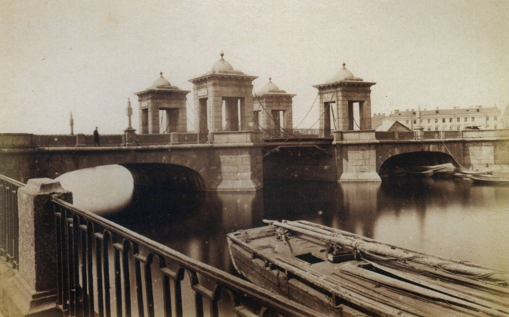 Старо-Калинкин мост через Фонтанку, отпечаток на альбуминовой бумаге